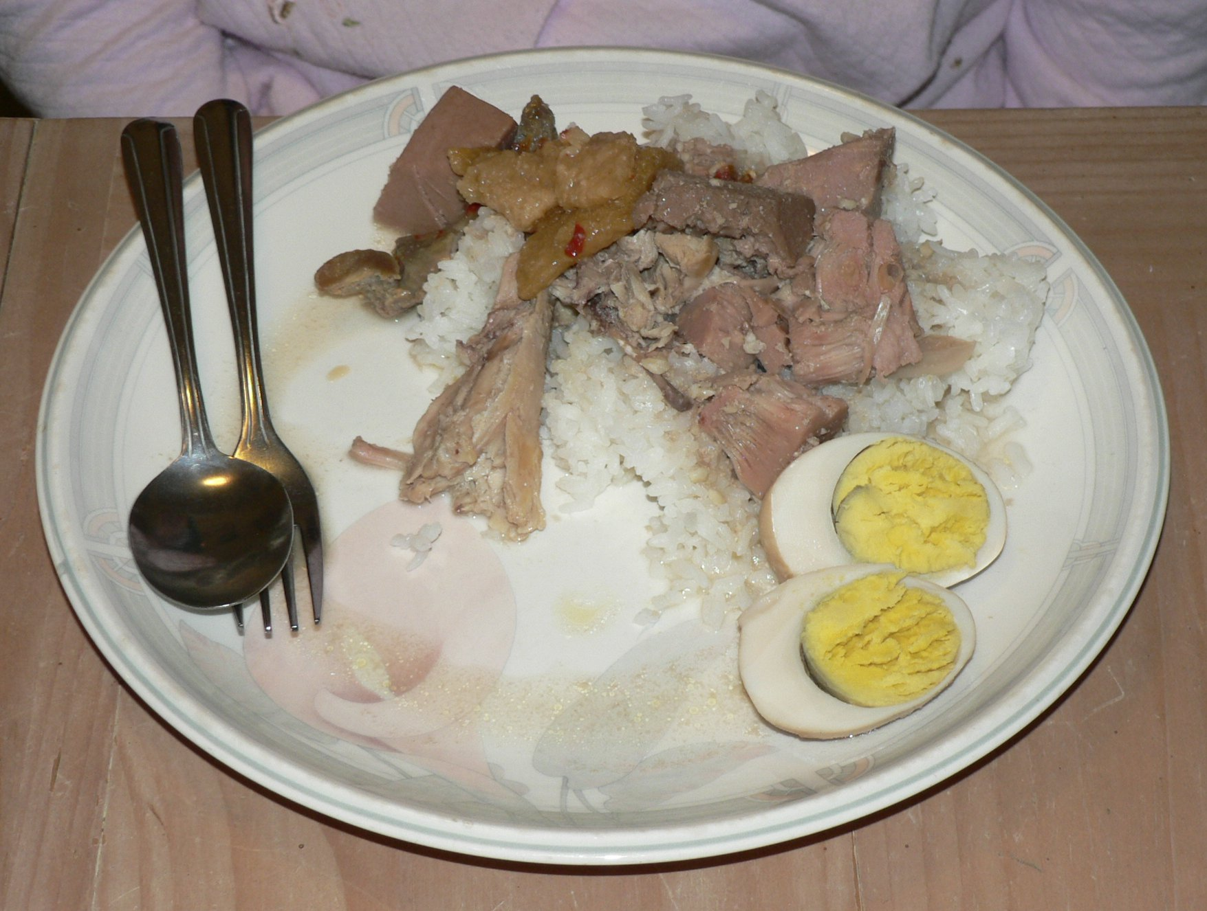 Gudeg, or "Green Jack Fruit Sweet Stew"